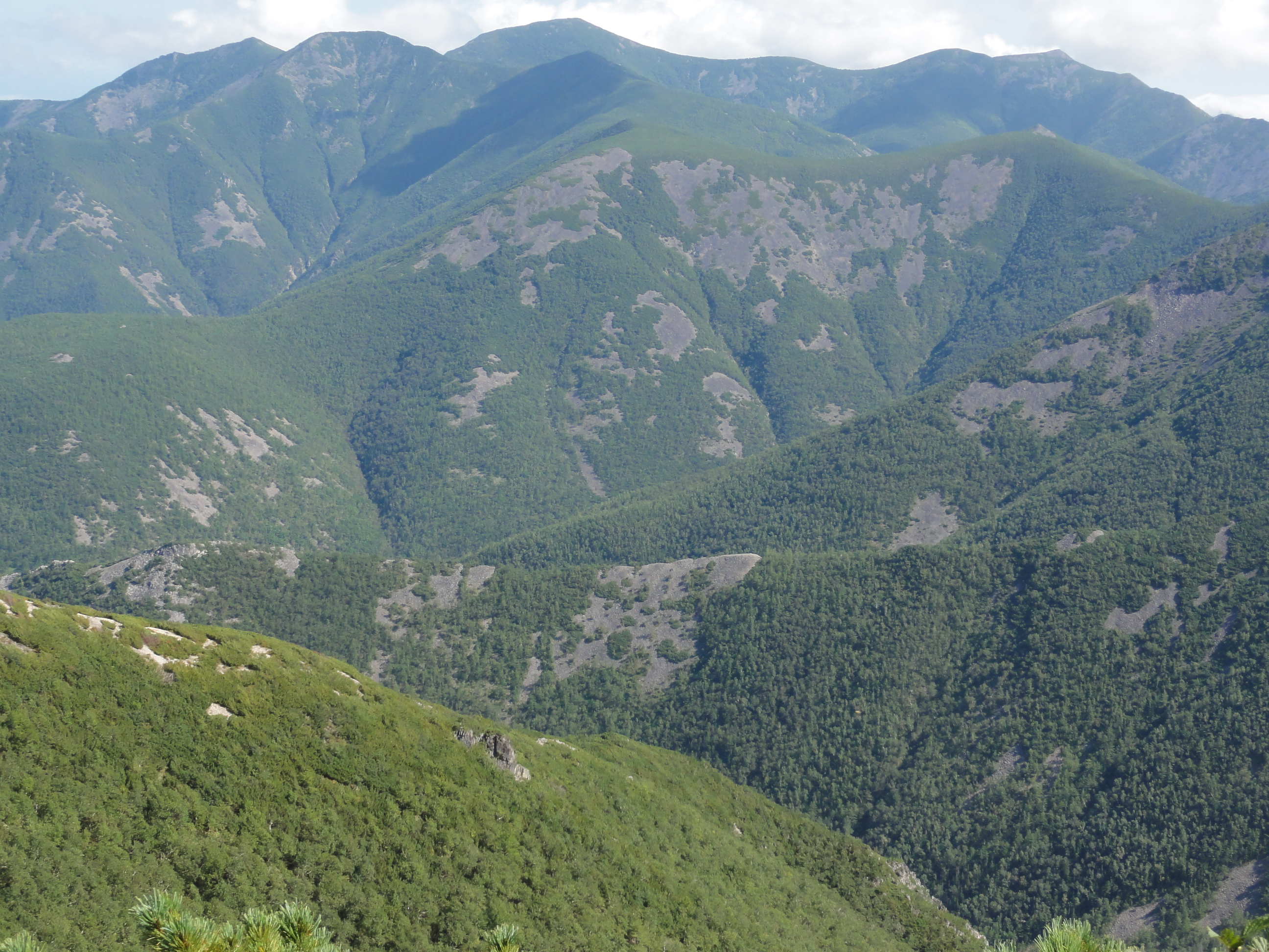 Бассейн Правой Амгу